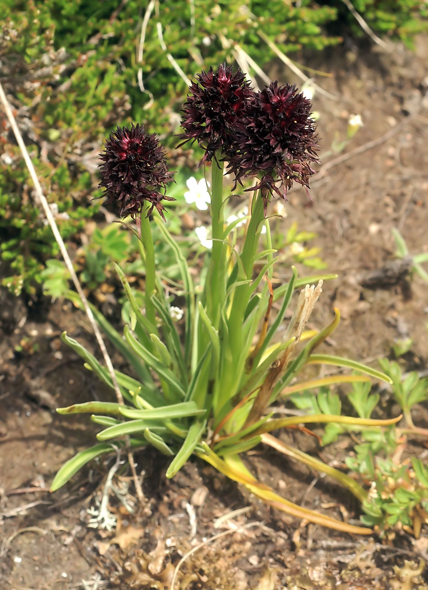 Nigritella rhellicani